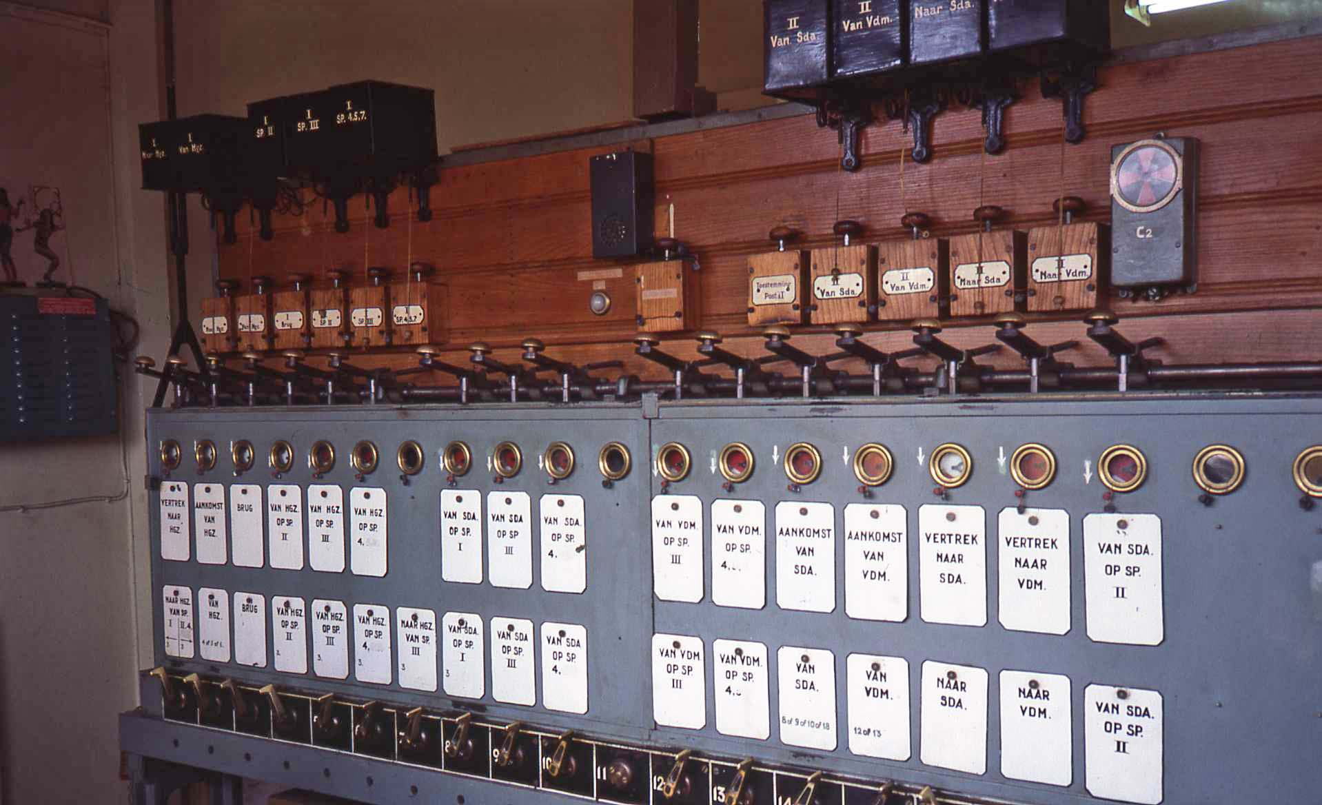 Oude seinhuis in Zuidbroek. Hier worden piloot stokken uitgegeven. (Toestemming om een blok in te rijden)